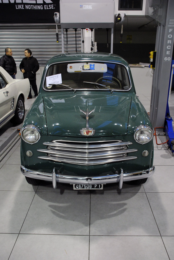 Car. Model: Fiat 1100/103 B. Year: 1956.